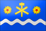 Vlajka Jakubčovic nad Odrou